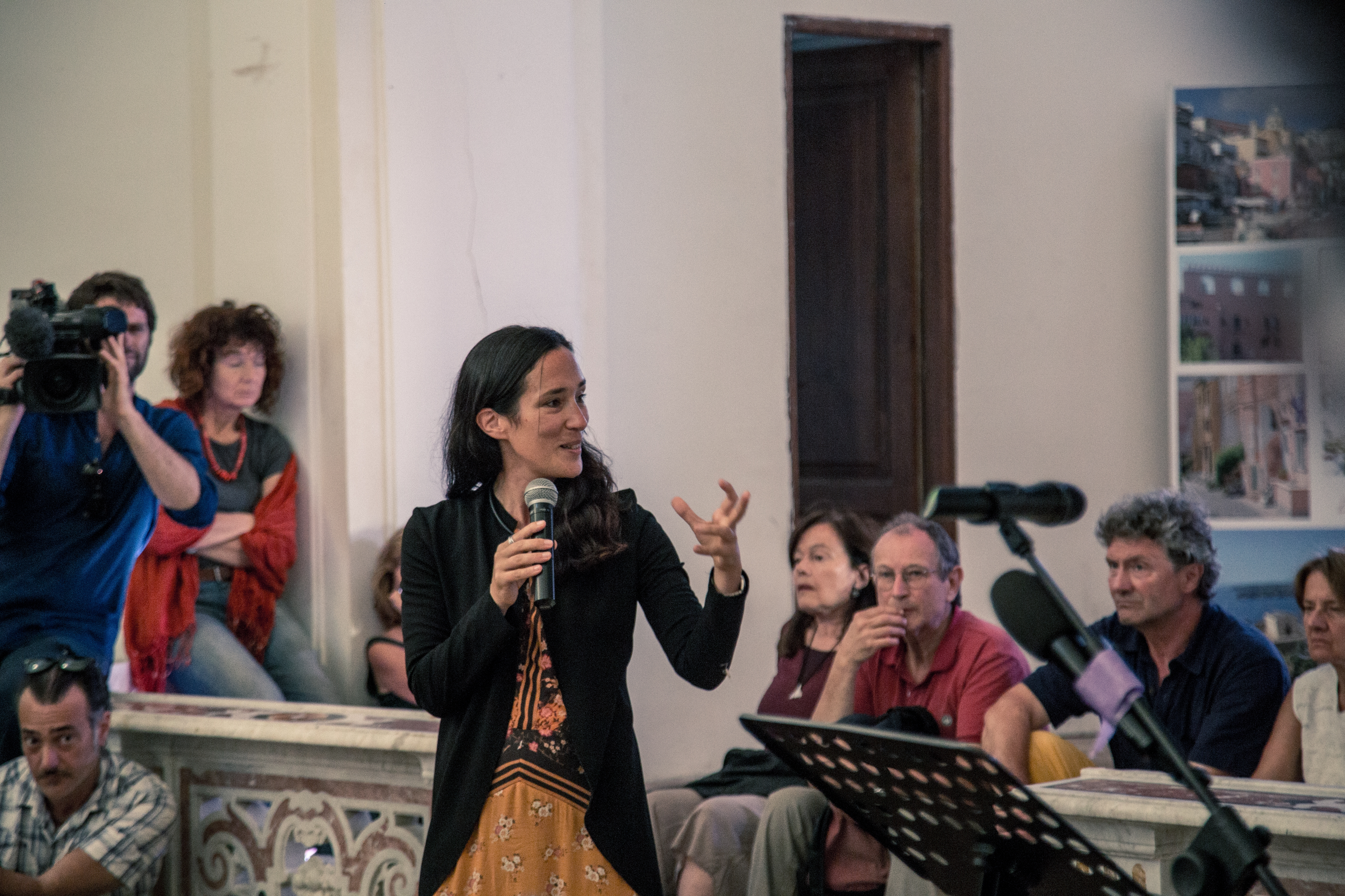 Chiara nella sua Procida